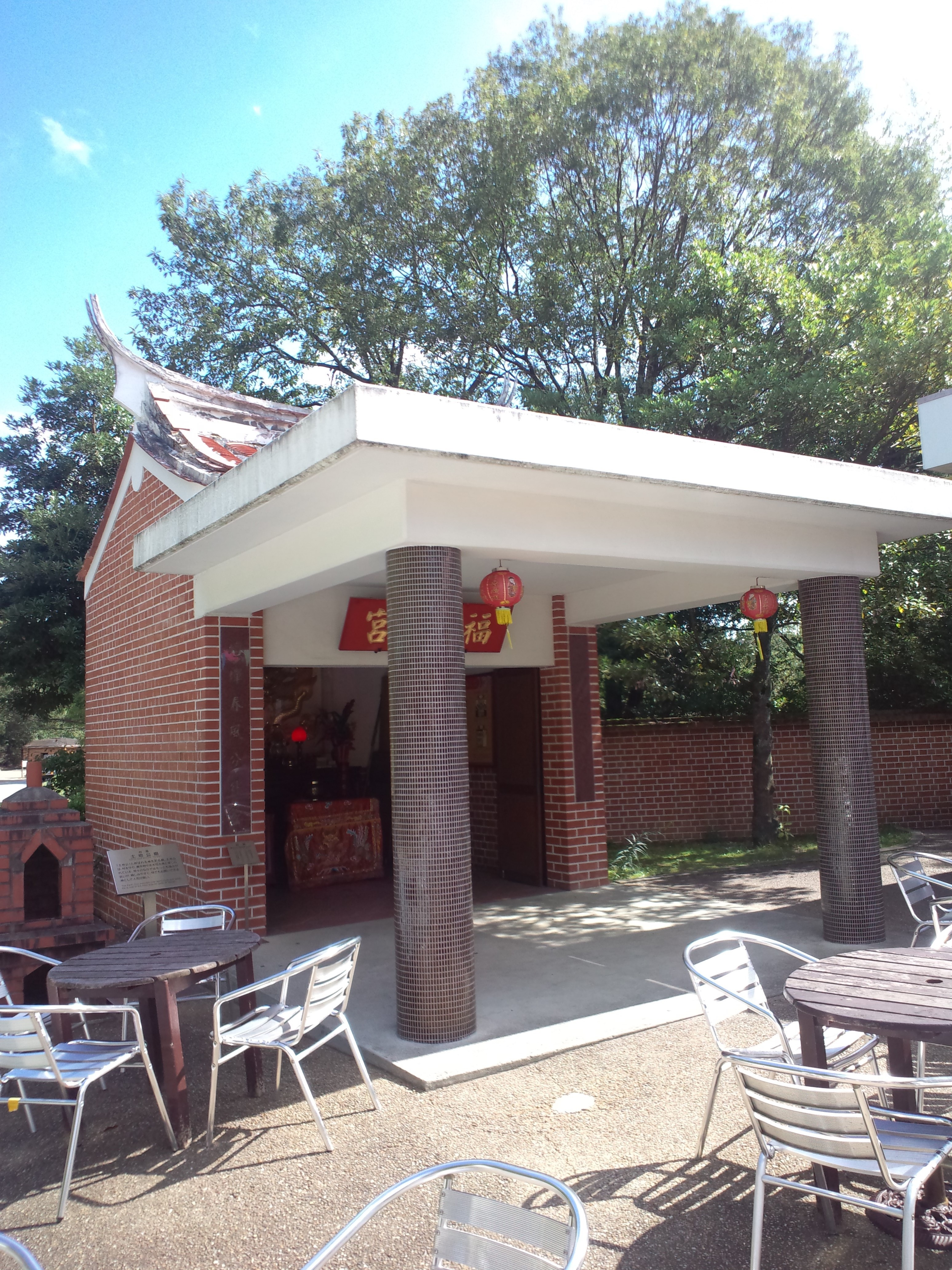 リトルワールド 台湾 農家 土地公廟